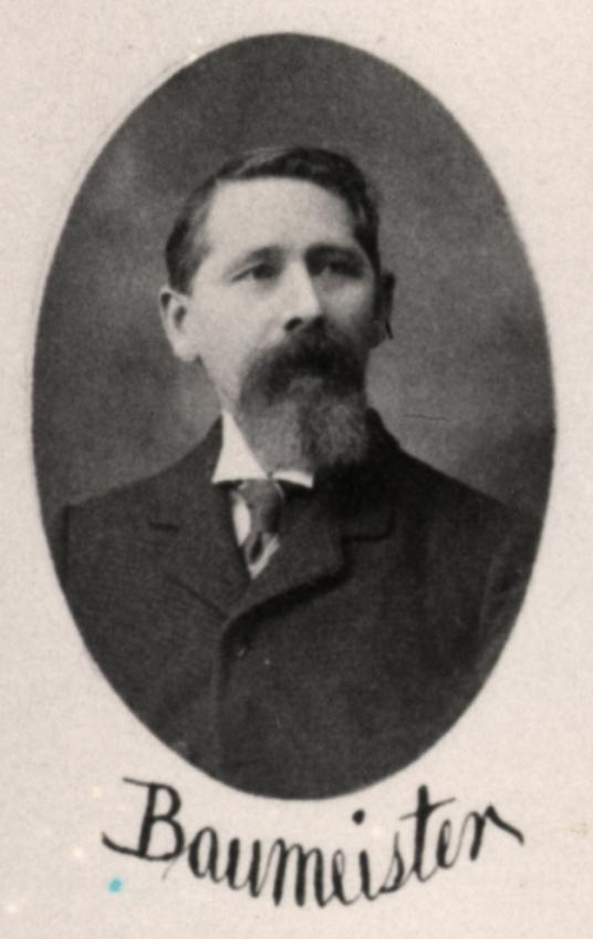 Sen E Baumeister